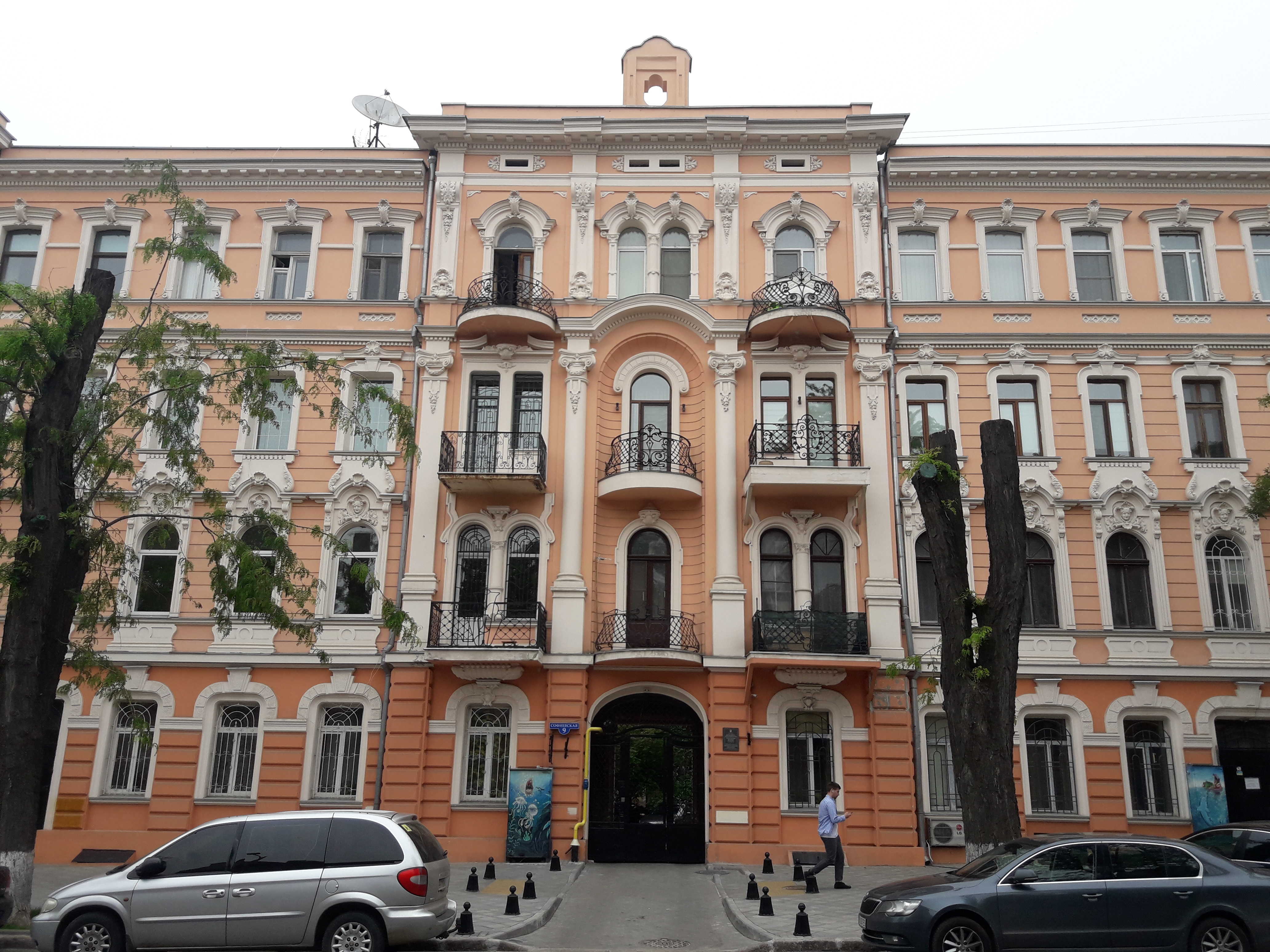 Будинок прибутковий Руссова, у якому жив І.Е. Замичковський - український драматичний актор